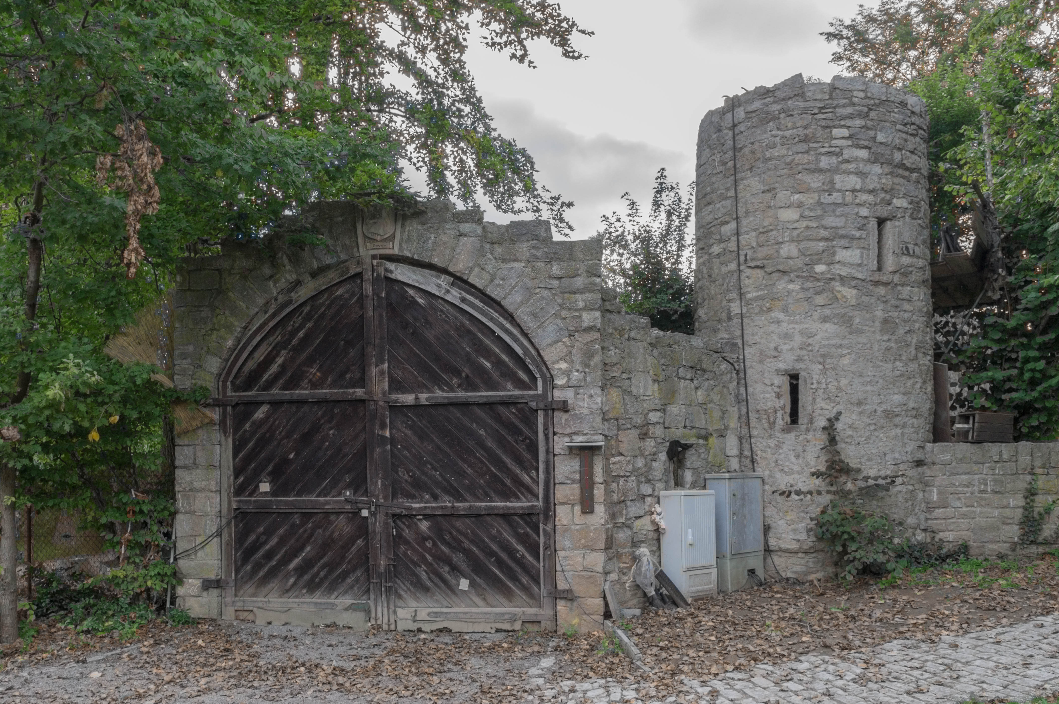 Schlossruine, Am Geyerschloß 7, Giebelstadt This is a photograph of an architectural monument.